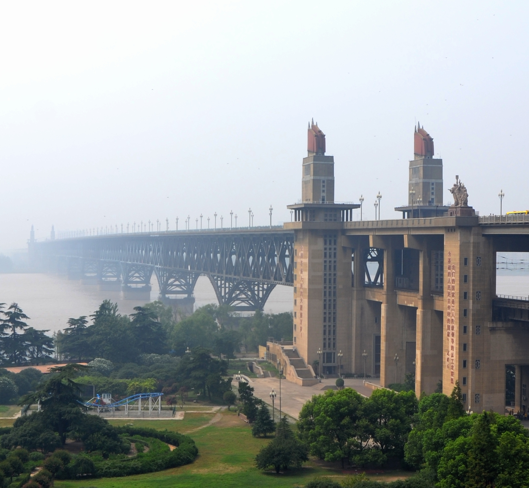 Nanjing Yangtze River Bridge（南京长江大桥）